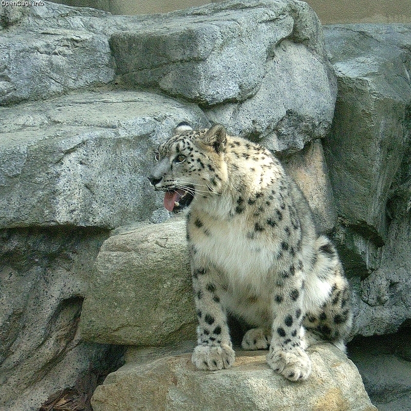 ユキヒョウ（Snow Leopard 学名：Uncia uncia）